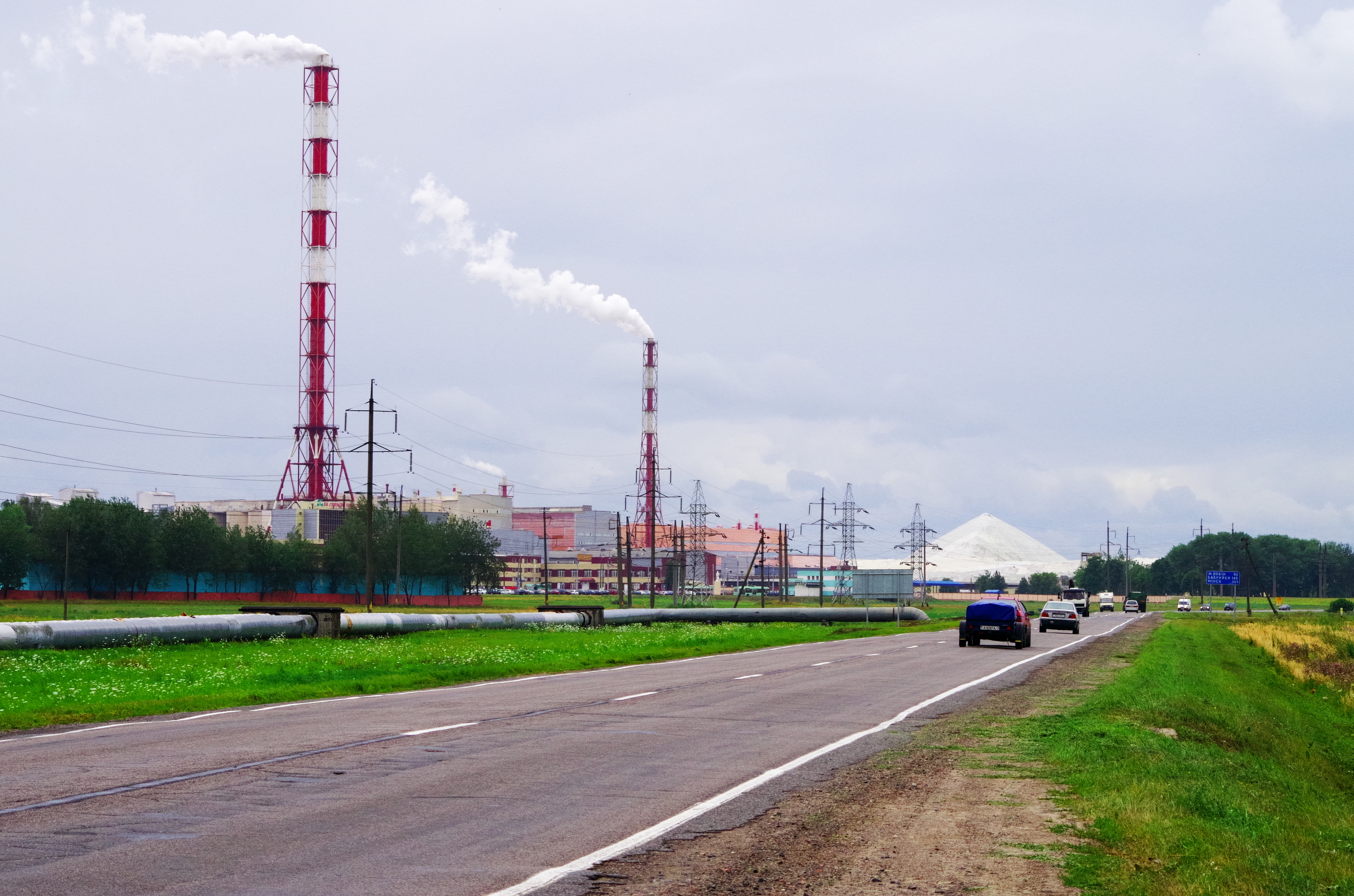 Промышленный пейзаж. Гомель. Беларусь.